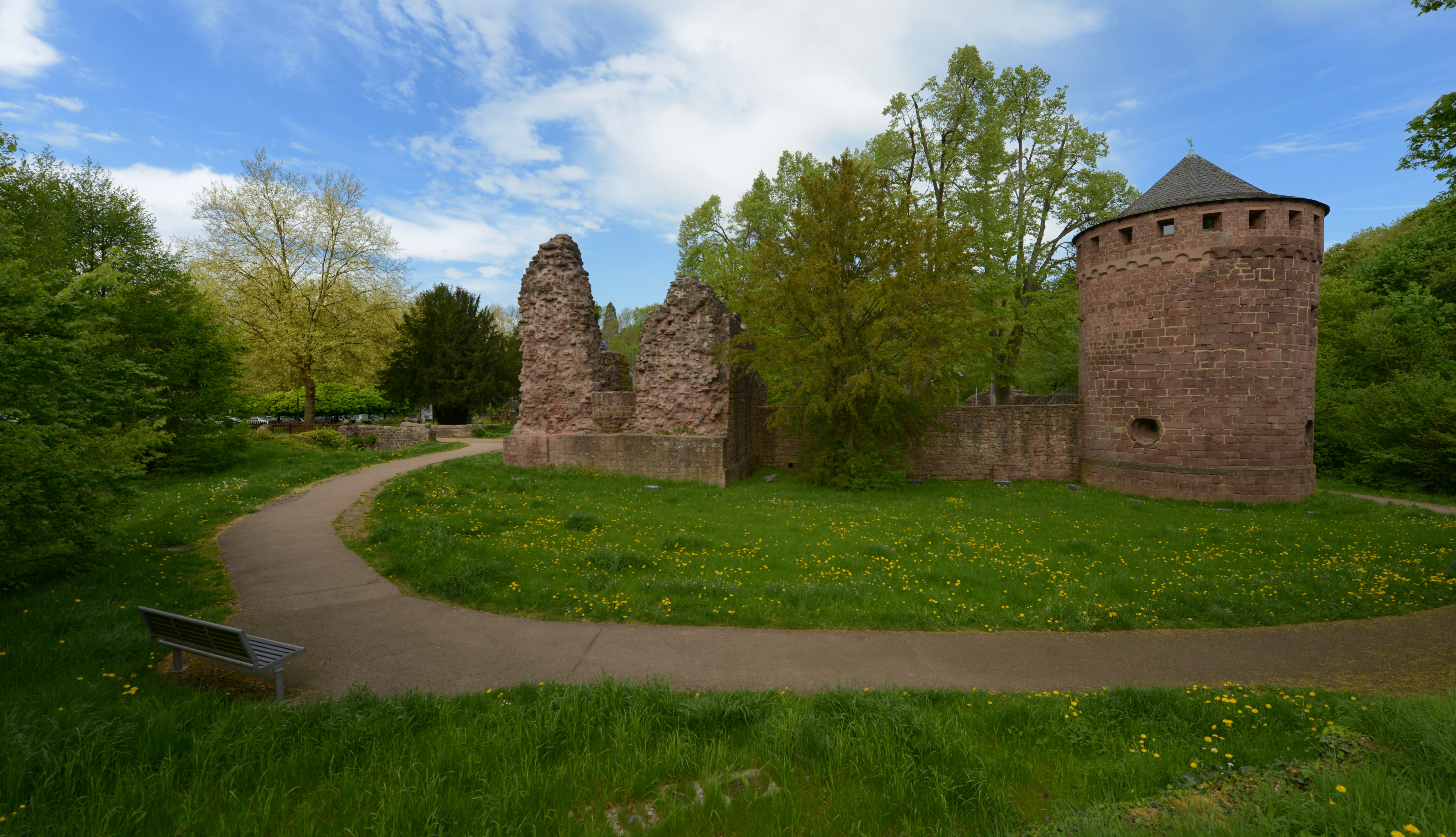 Burg Kerpen in Illingen, Saarland/ Deutschland (2018).